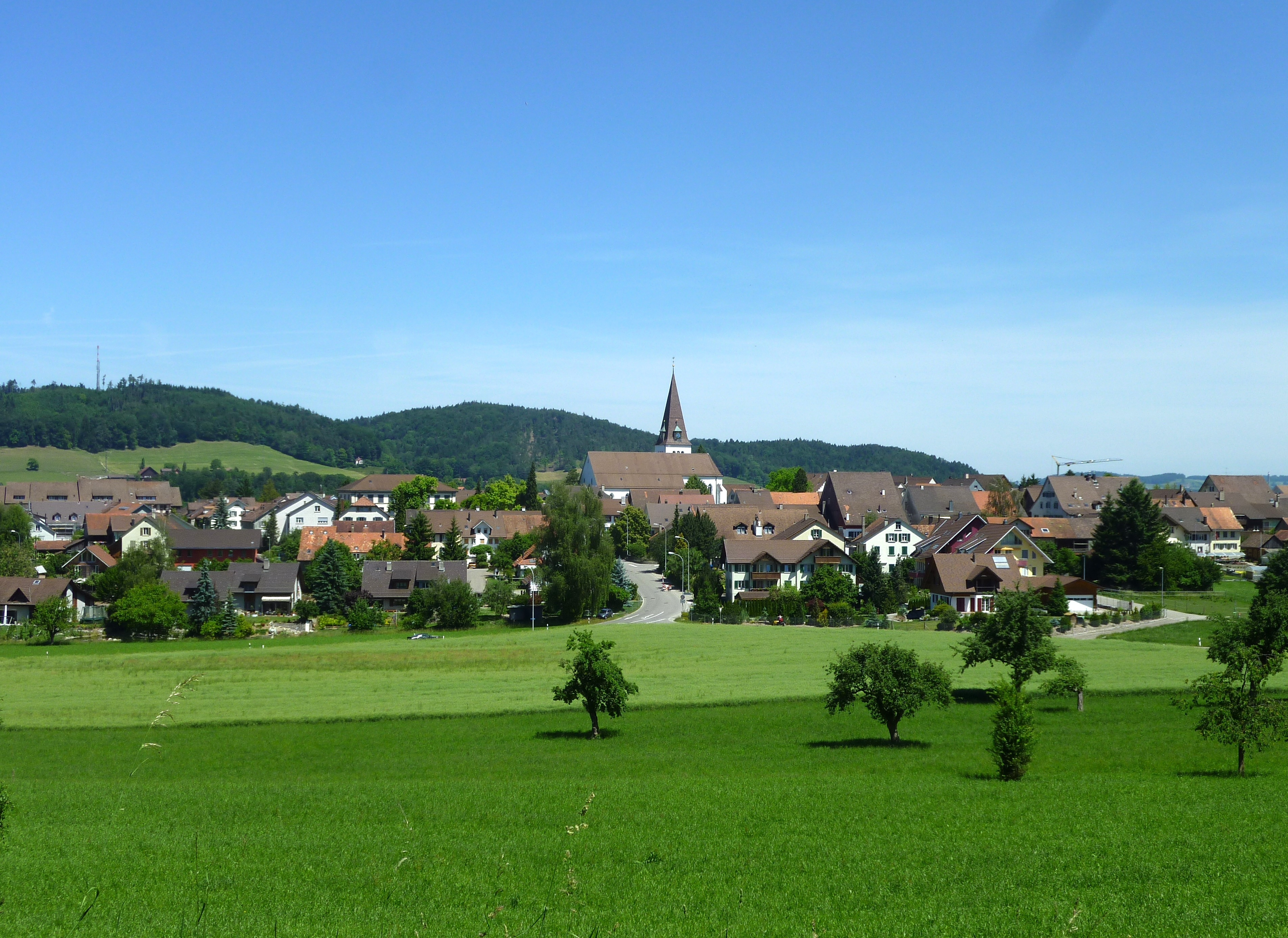 Elgg